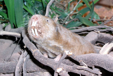 Fukomys anselli (formerly Cryptomys anselli)